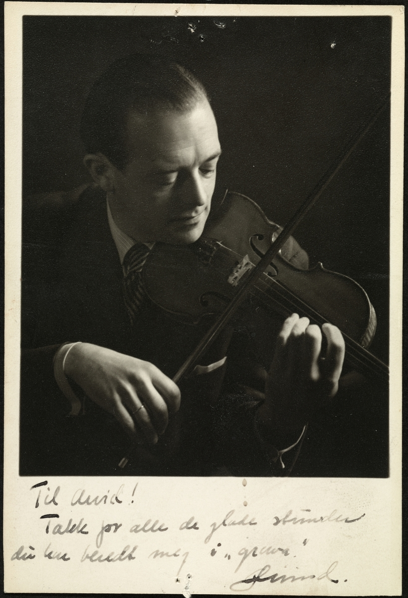 Øivind Bergh, 1945. Påskrift: "Til Arvid! Takk for alle de glade studer du har vendt meg i "graven". Øivind.""